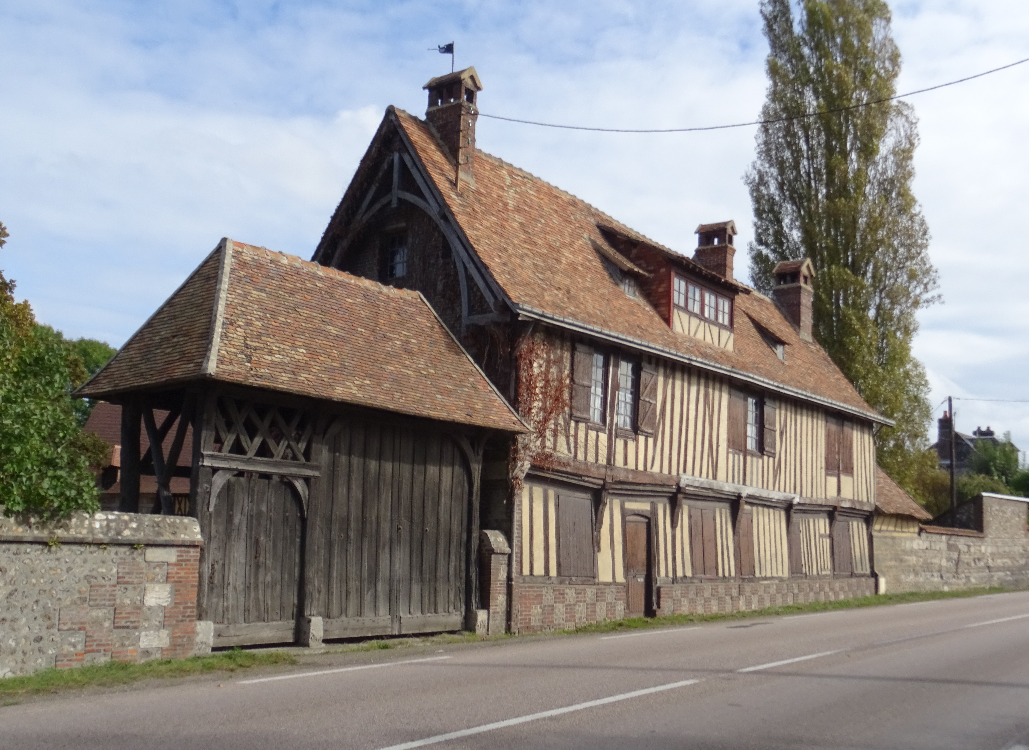 Ancienne auberge du Grand Chouquet Royal à Caumont (Eure, Normandie), sur la RD 675.